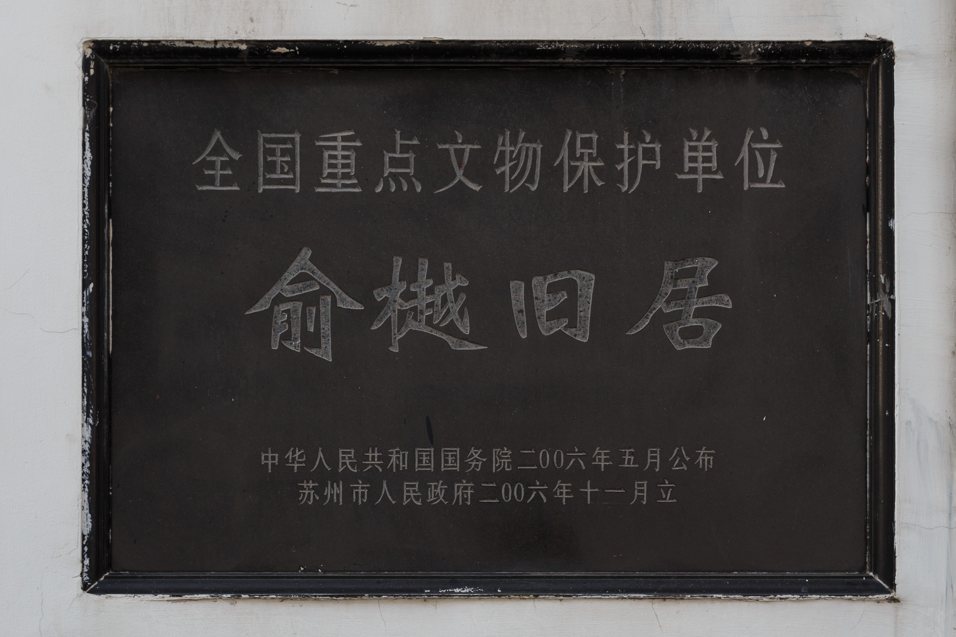 苏州俞樾旧居——曲园